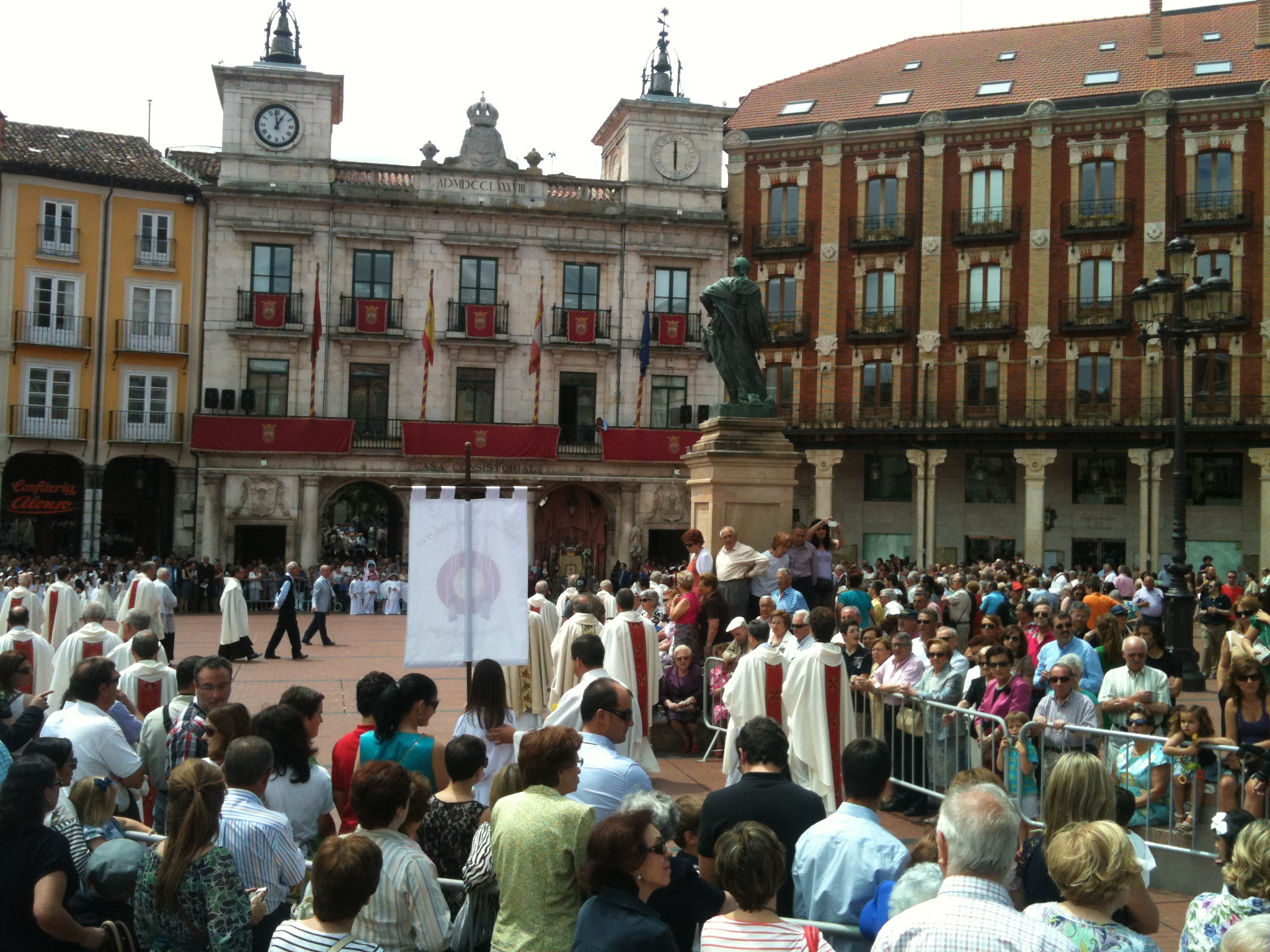 Corpus Christi, Plaza de Burgos, 2014